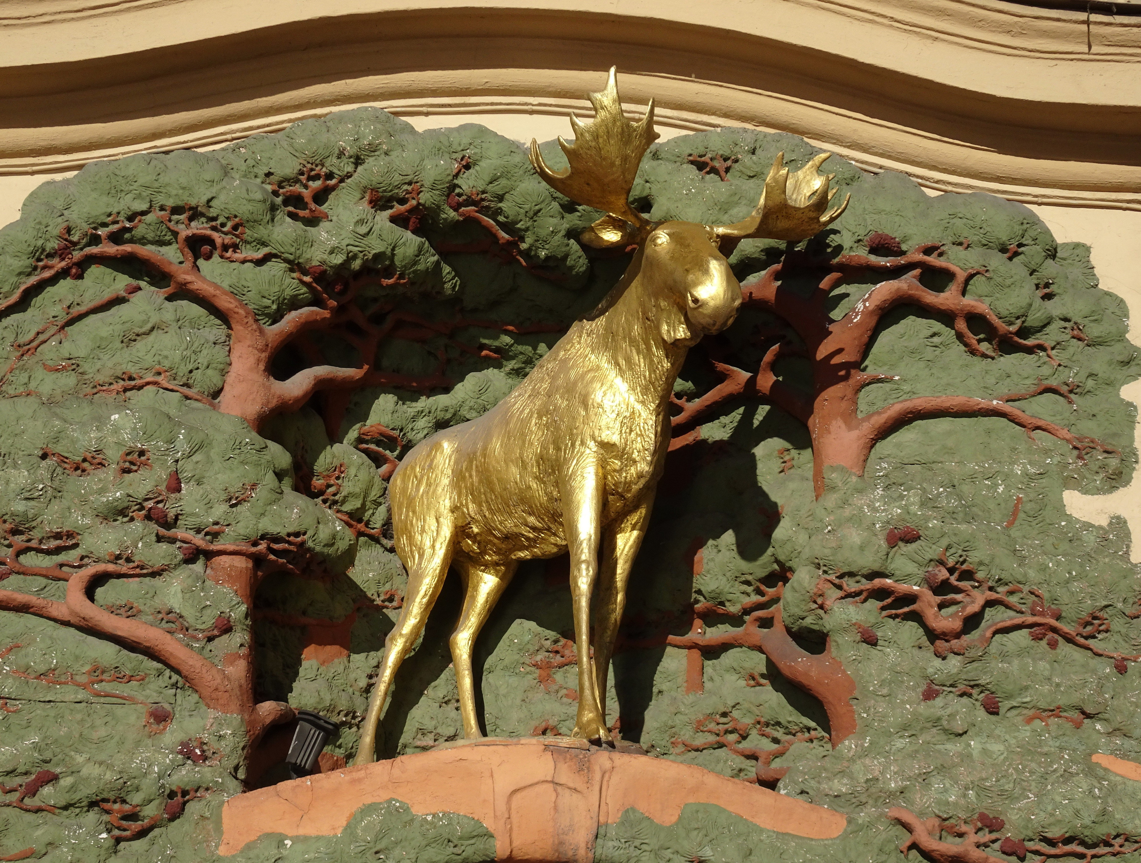 Apoteket Älgen (Elgen) vid Karlavägen 27, Engelbrektsgatan 27, Stockholm. Apoteket öppnade 1904 och Älgen i förgylld metall ovanför entrén vid Apoteket Älgen skapades av skulptören Carl Fagerberg 1903, medan han ännu studerade vid Konstakademien i Stockholm.